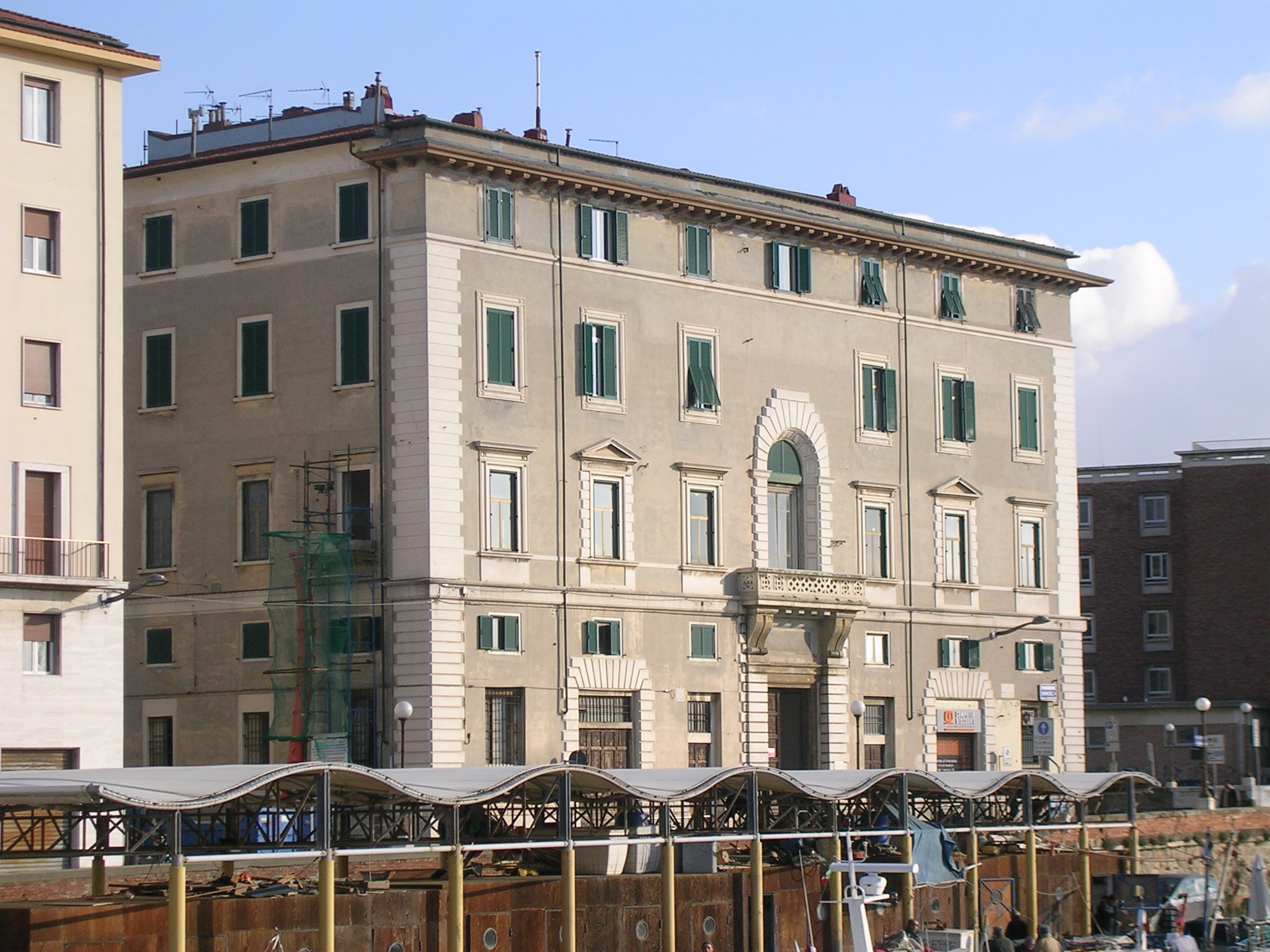 Livorno: il Palazzo Squilloni tra gli scali Cialdini e il Fosso Reale.